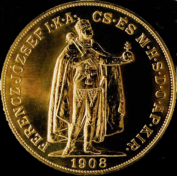 100 Korona 1908 - obverse